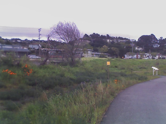 lo doy